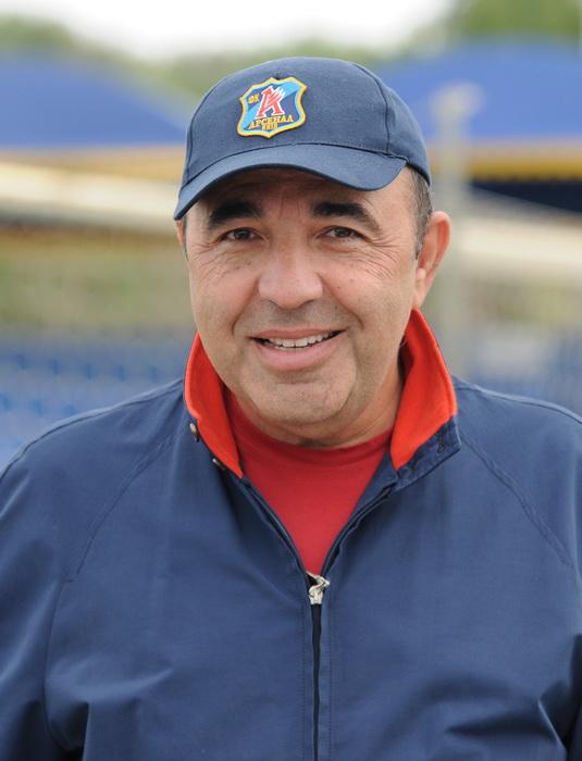 Вадим Зиновьевич Рабинович — украинский предприниматель. Бывший президент футбольного клуба Арсенал (Киев).